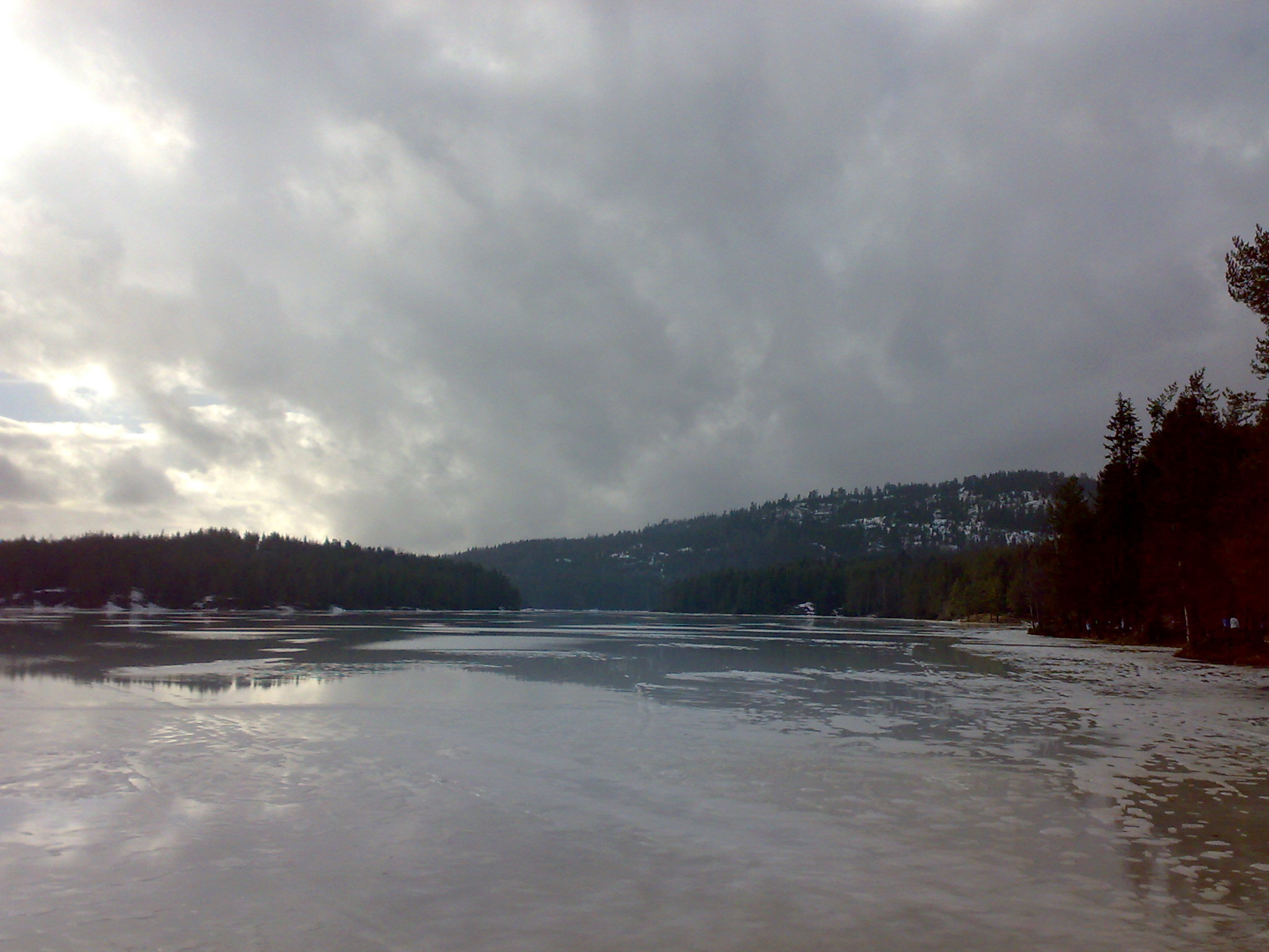 Østernvann, Östernvann, Bærum, Bärum, Norge, Norway